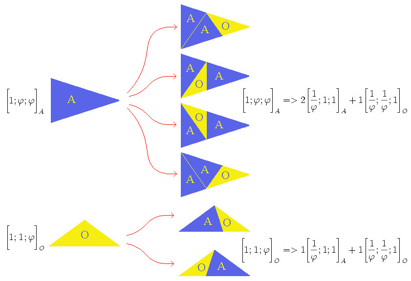 Les diverses possibilités de découpage des triangles d'or, telles que les morceaux soient eux-mêmes des triangles d'or (de plus petite taille) (image personnelle)Papy77 2 décembre 2005 à 17:09 (CET)